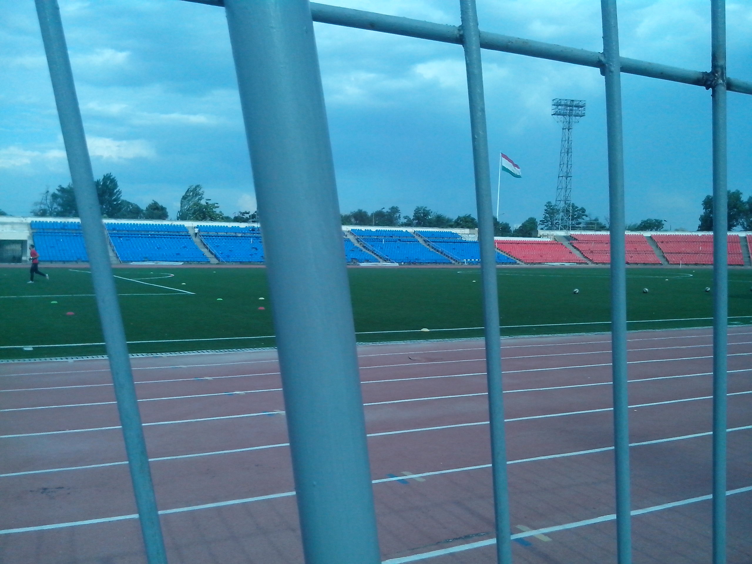 Стадион Истиклола